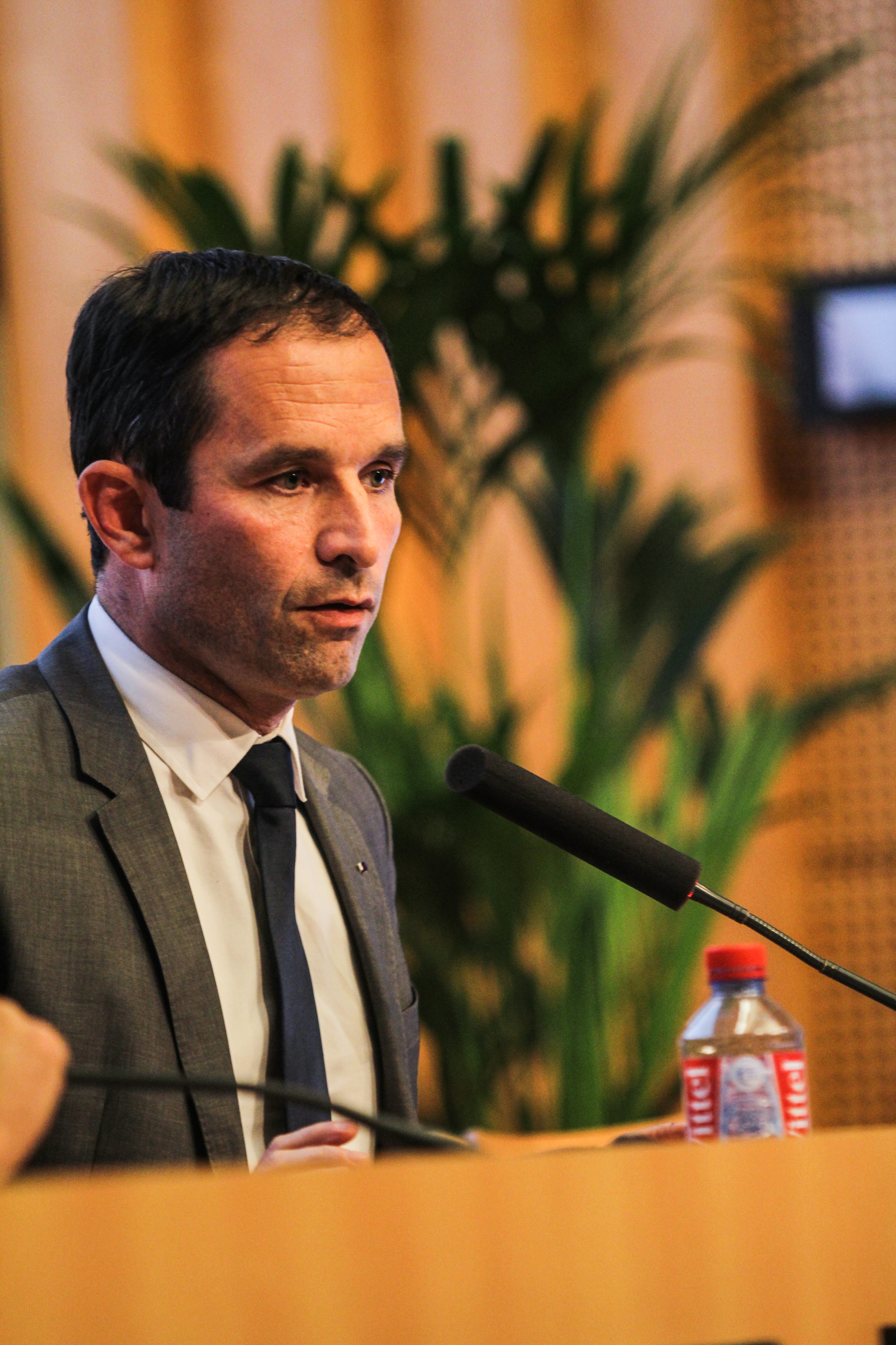 Benoit Hamon.jpg